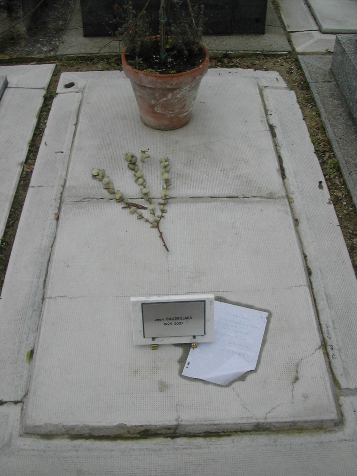 Tombe du philosophe et sociologue Jean Baudrillard au cimetière du Montparnasse.